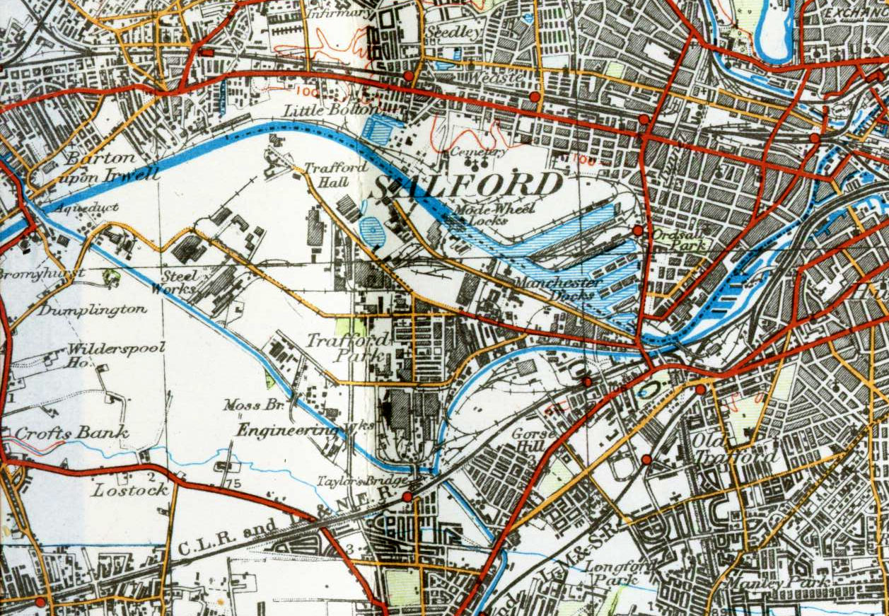 old OS map